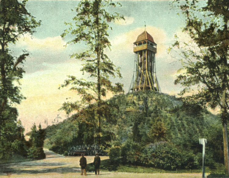 Scherbelberg im Leipziger Rosental mit hölzernen Aussichtsturm, vermutlich um die Jahrhundertwende.